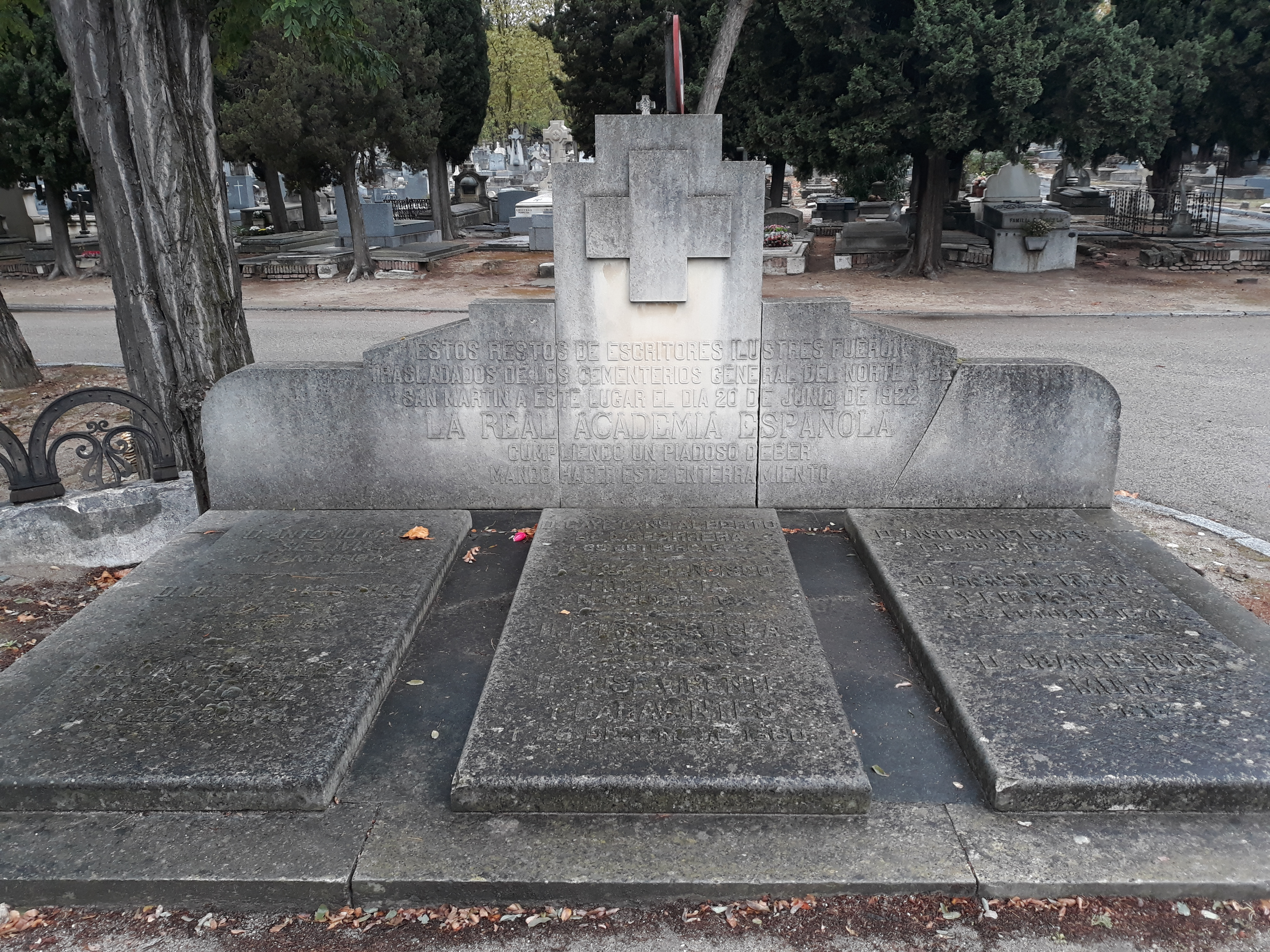 Der Panteon des hombres iluustres (Umbettungen von aufgelassenen Friedhöfen) auf dem Almudena-Friedhof in Madrid.